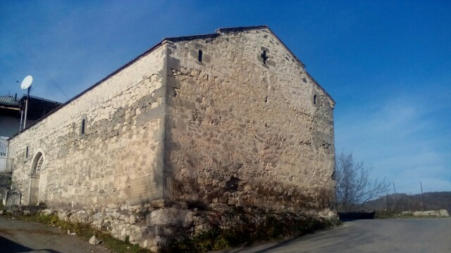 Սուրբ Ստեփանոս եկեղեցին